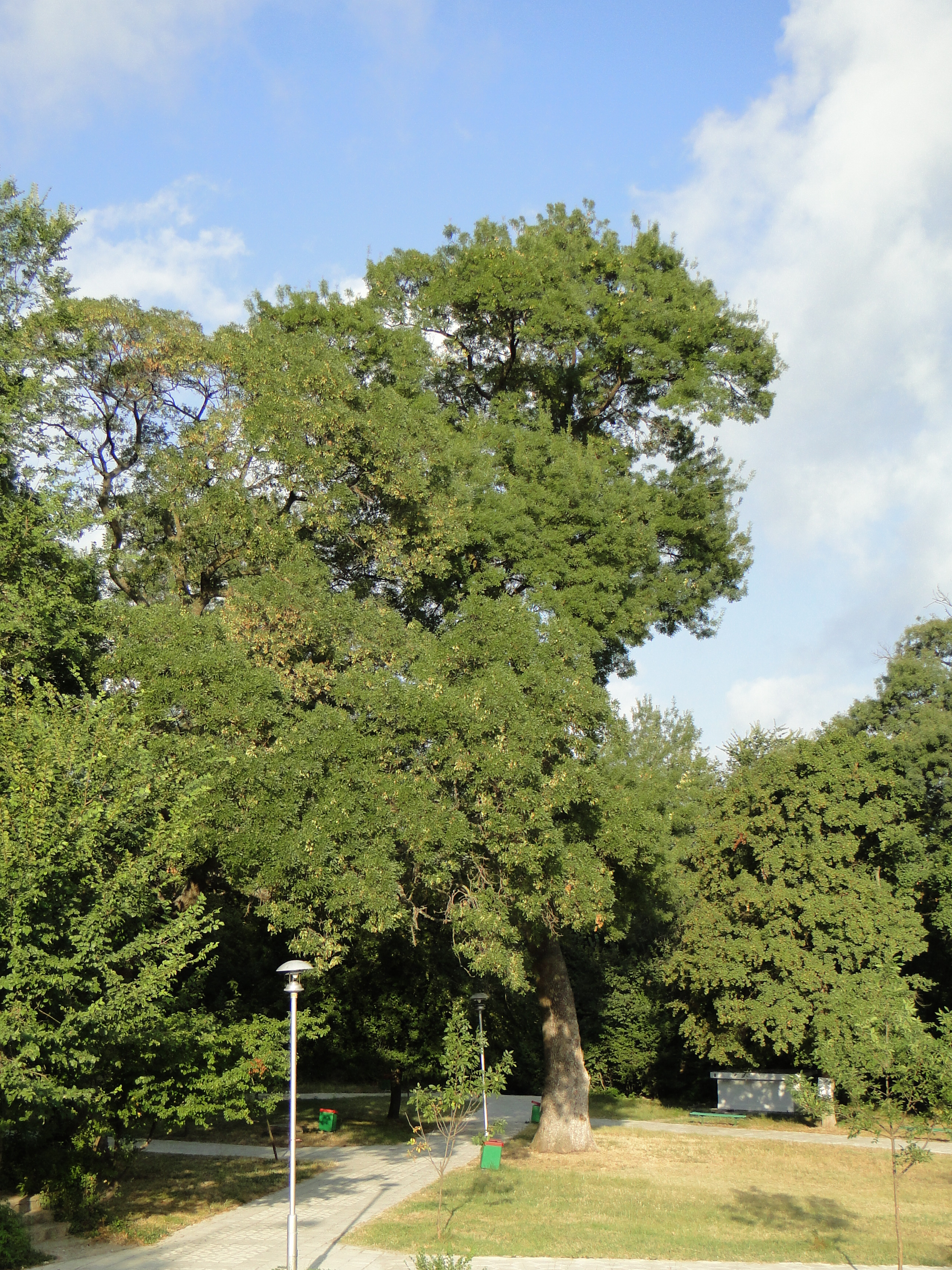 Китен Bulgaria